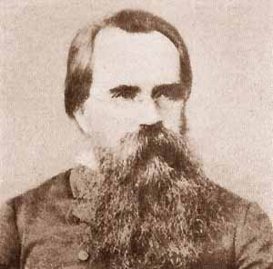 Alexander Kovalevsky